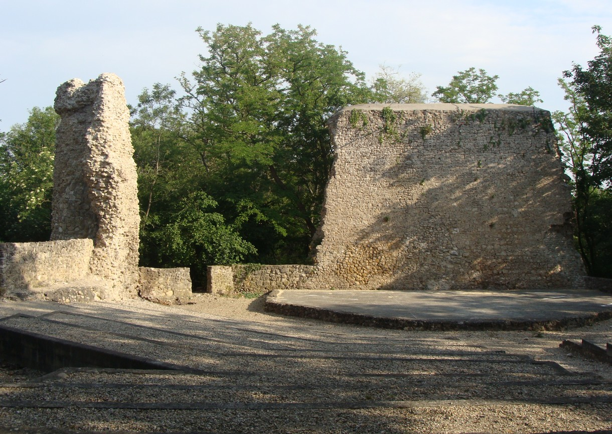 Les ruines de l'ancien château voisin de la chapelle Saint-Barthélémy de Montluel, où est aménagé un théâtre de verdure.